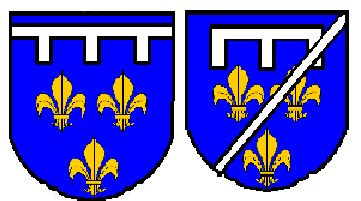 Eigen tekening Robert Prummel